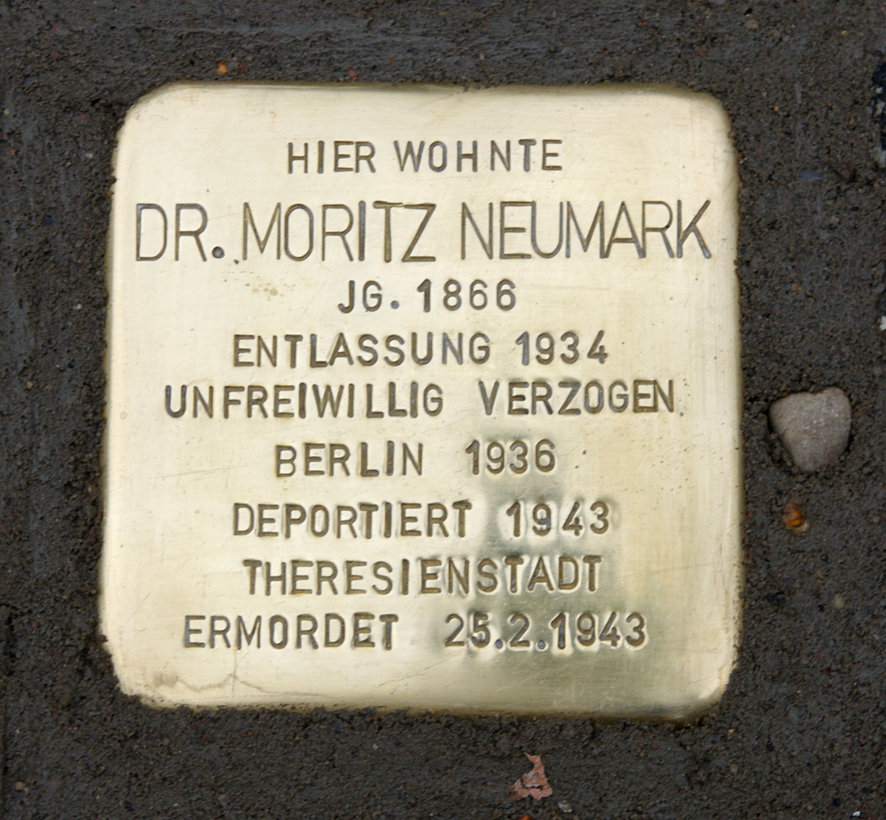 Stolperstein in Lübeck: Moritz Neumark (1866)